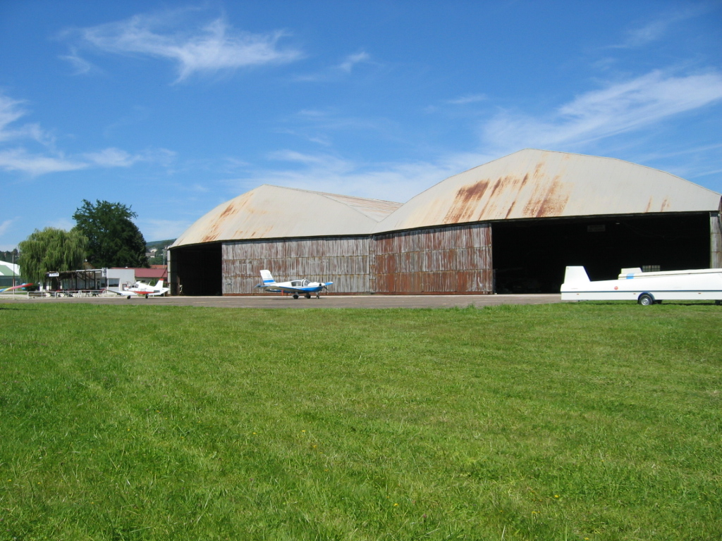 Aérodrome de Besançon-Thise